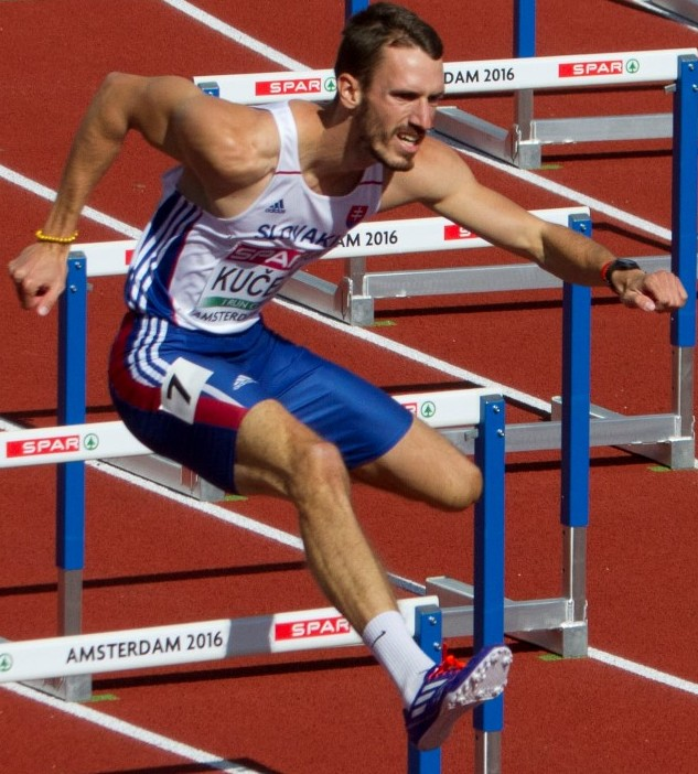 0161 kucera reeksen 400mH